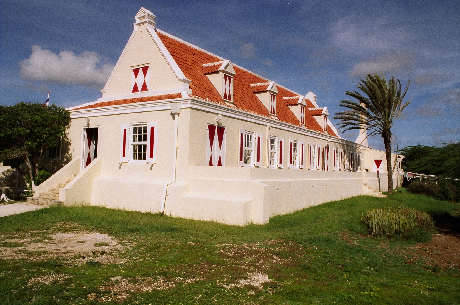 Plantagehuisje Ascersion.